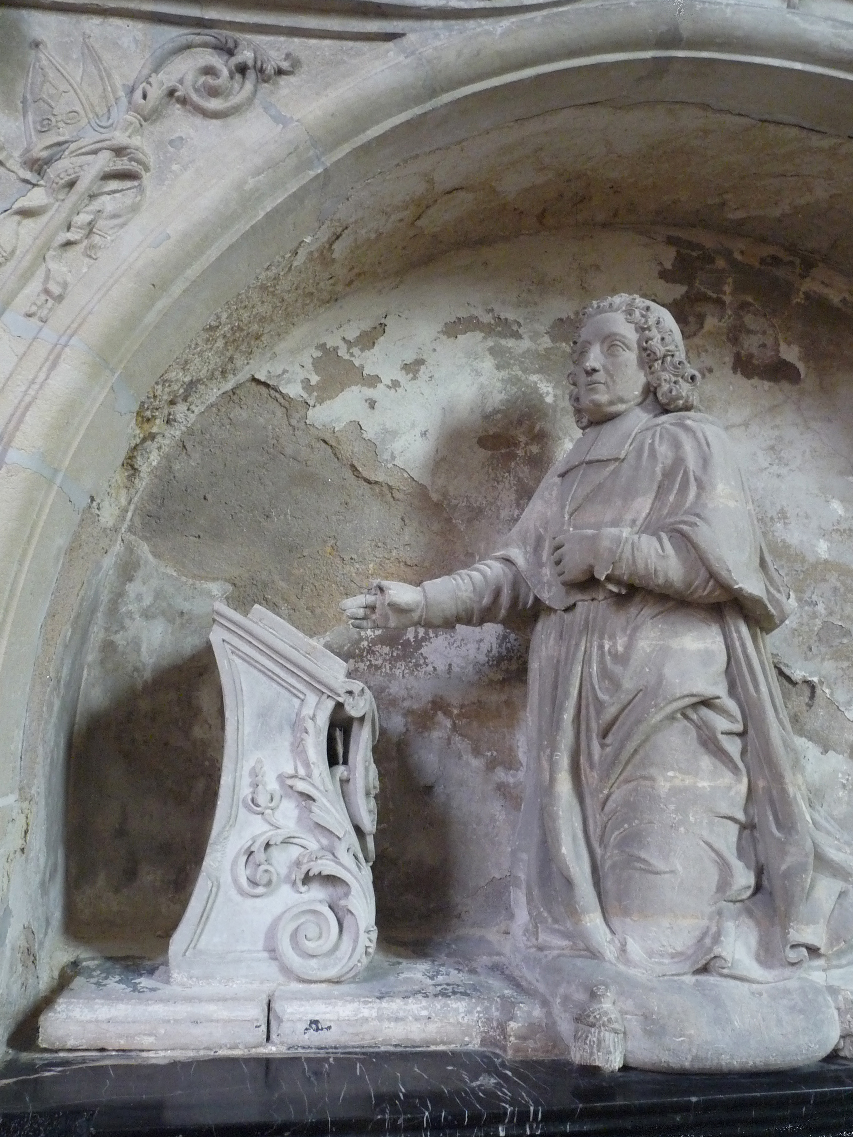 Monument funéraire de François d'Argouges, évêque de Vannes, dans la cathédrale Saint-Pierre de Vannes (Morbihan)